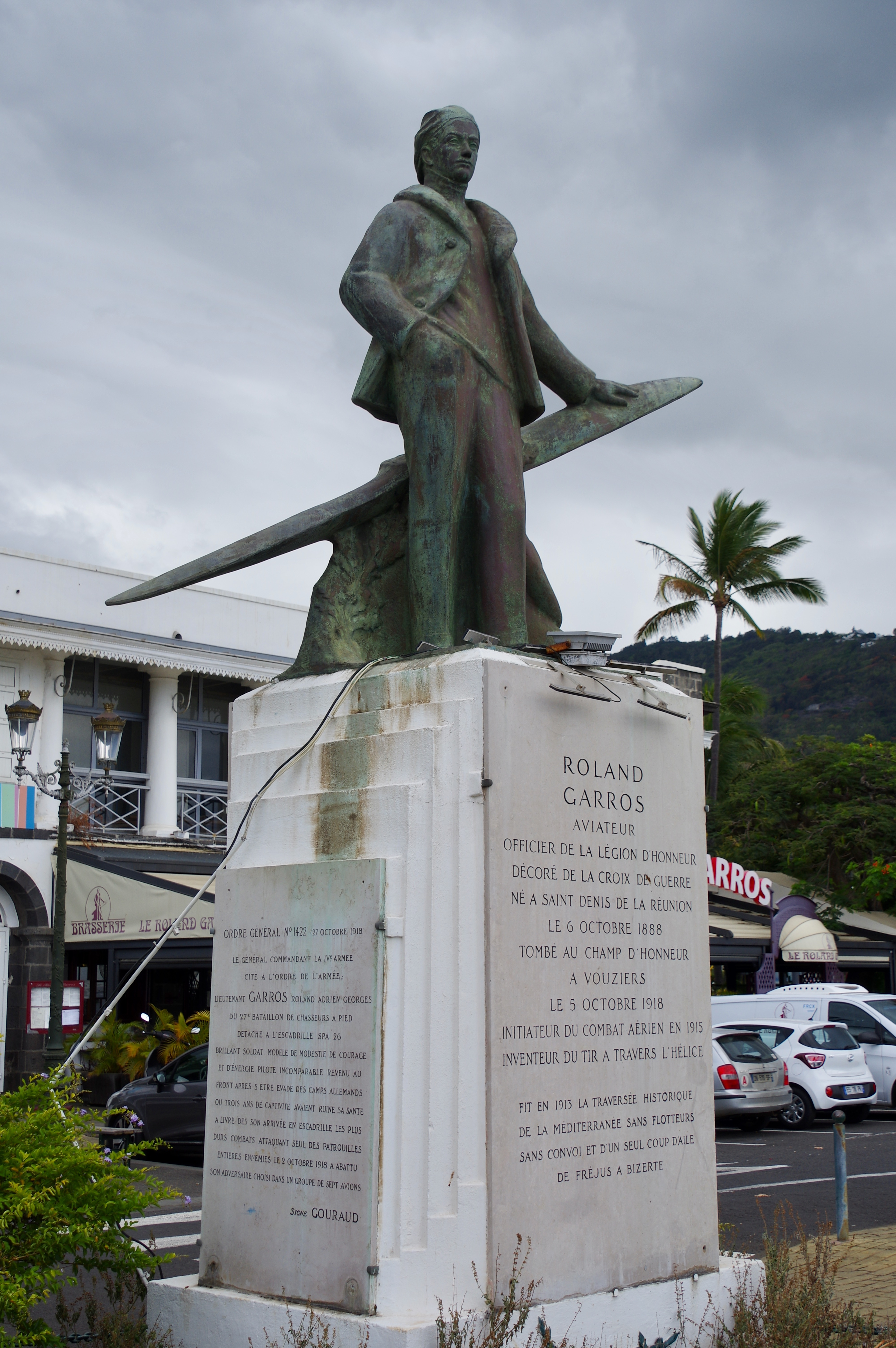 Statue Mémorial de Roland Garros, célèbre aviateur français né à Saint-Denis de la Réunion